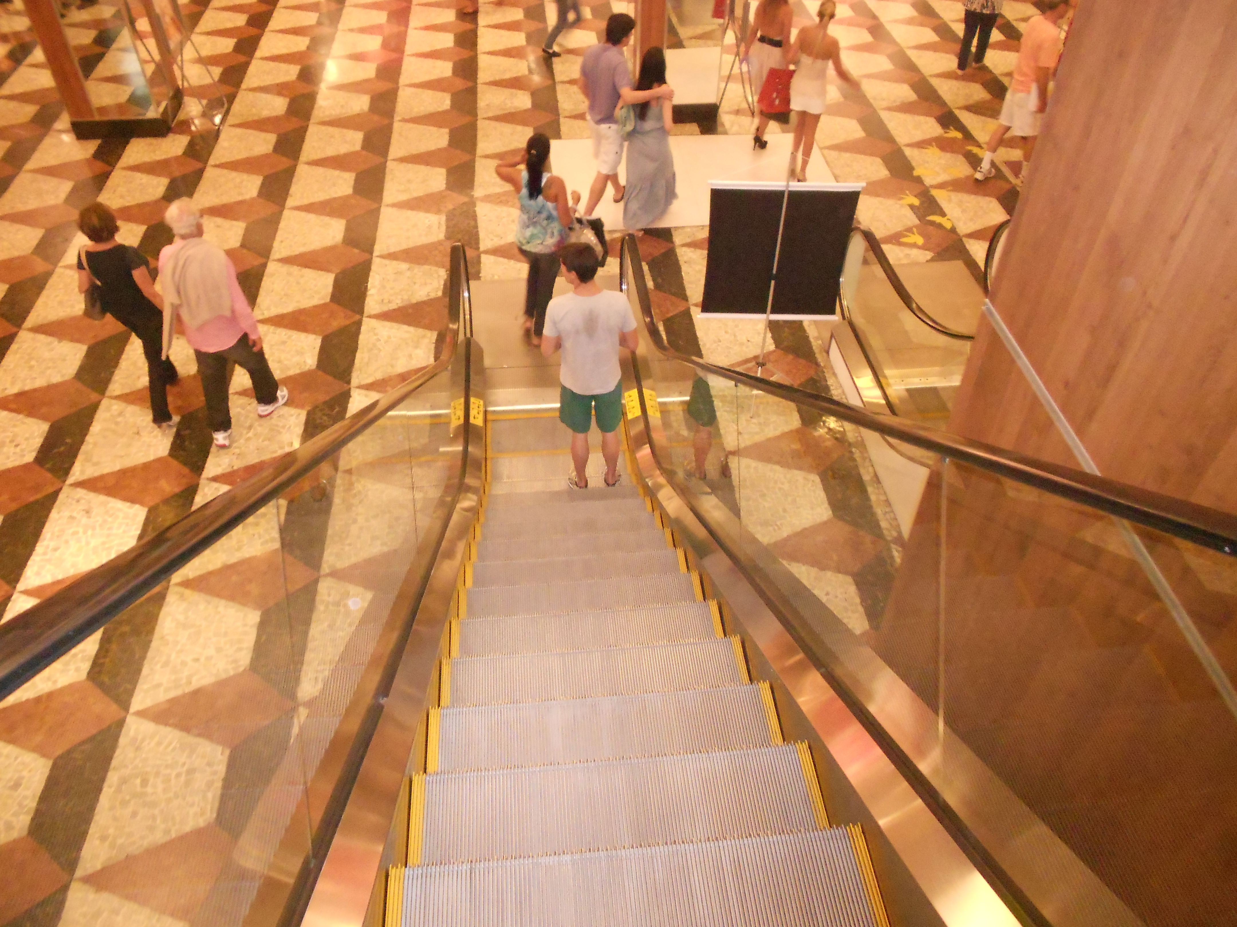 Escada rolante do Shopping da Gávea, Gávea, Rio de Janeiro, Brasil.